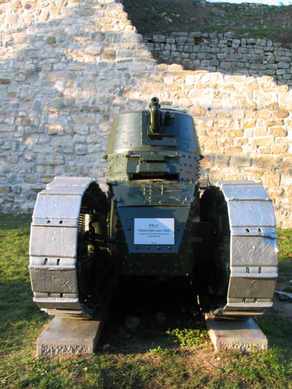 French tank Renault FT, Belgrade Military Museum, Serbia.